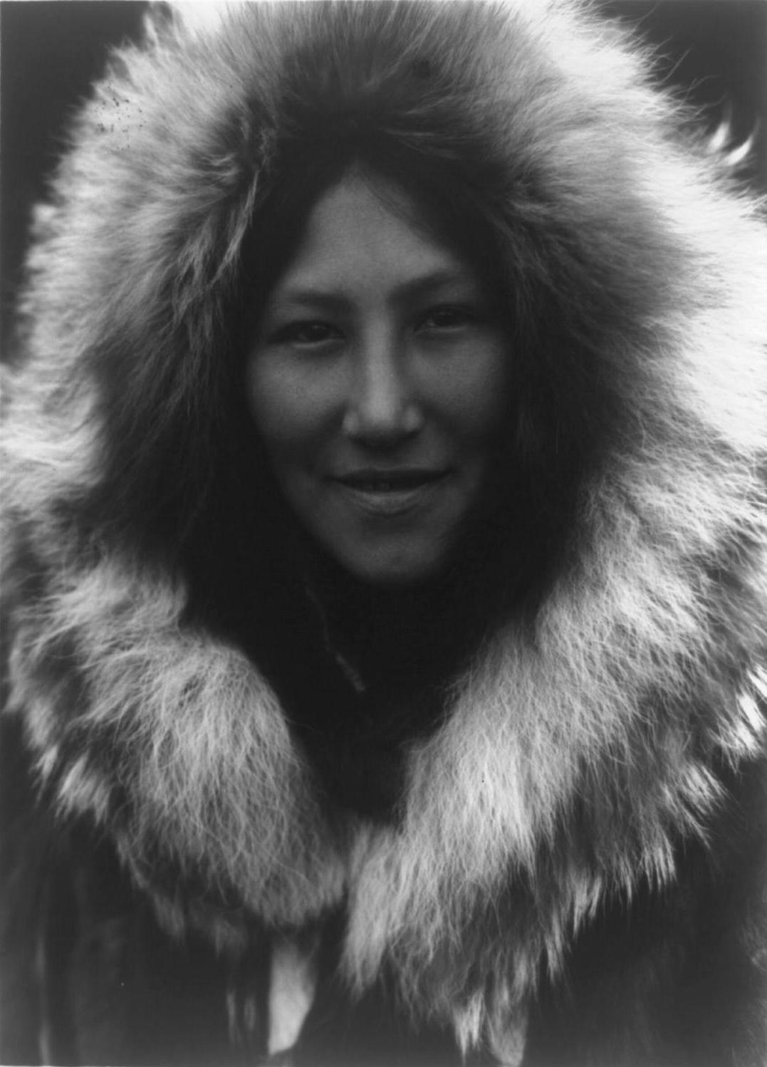 Dona inuit.